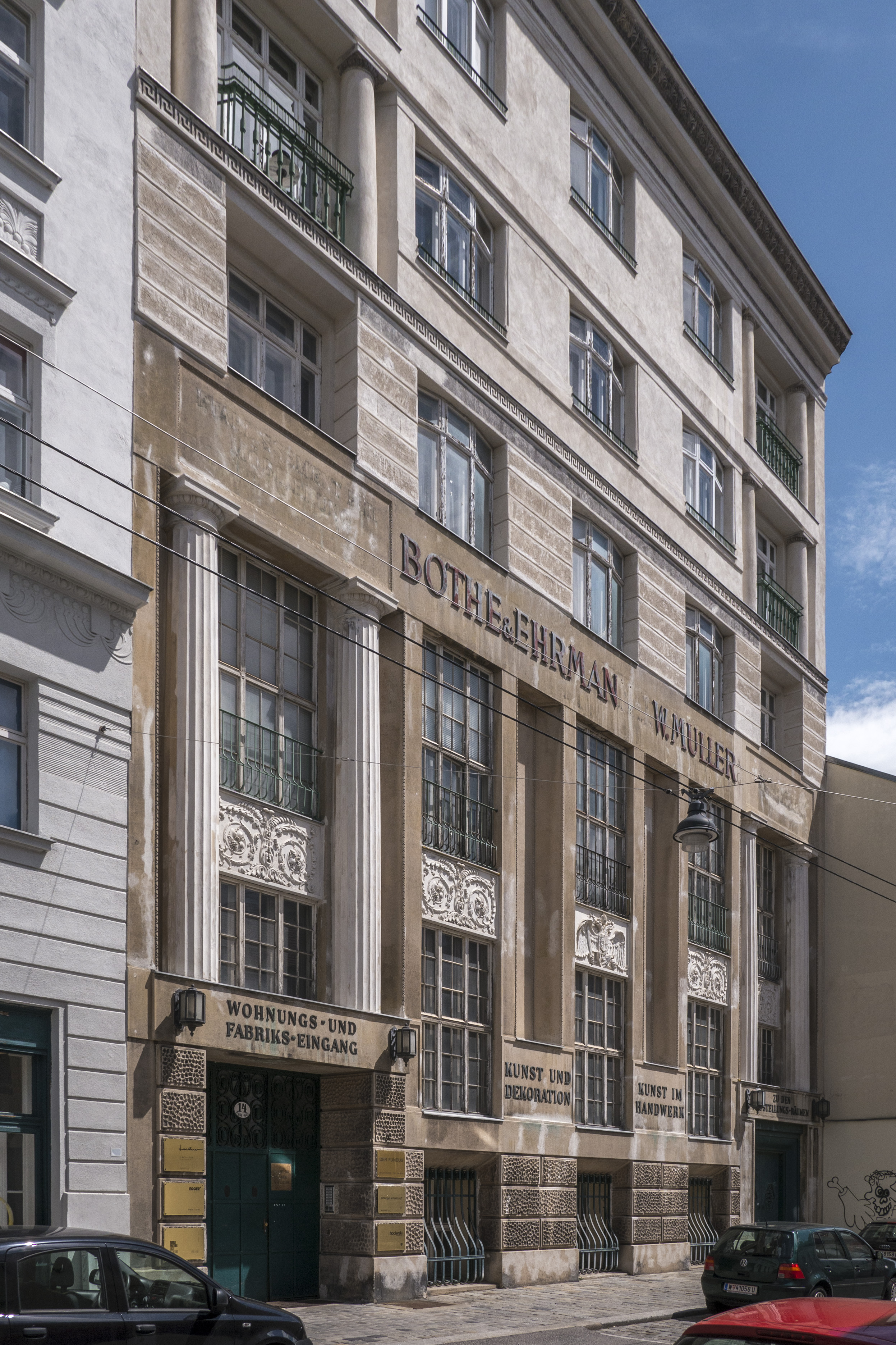 Wohn- und Geschäftshaus, Bothe und Ehrmann